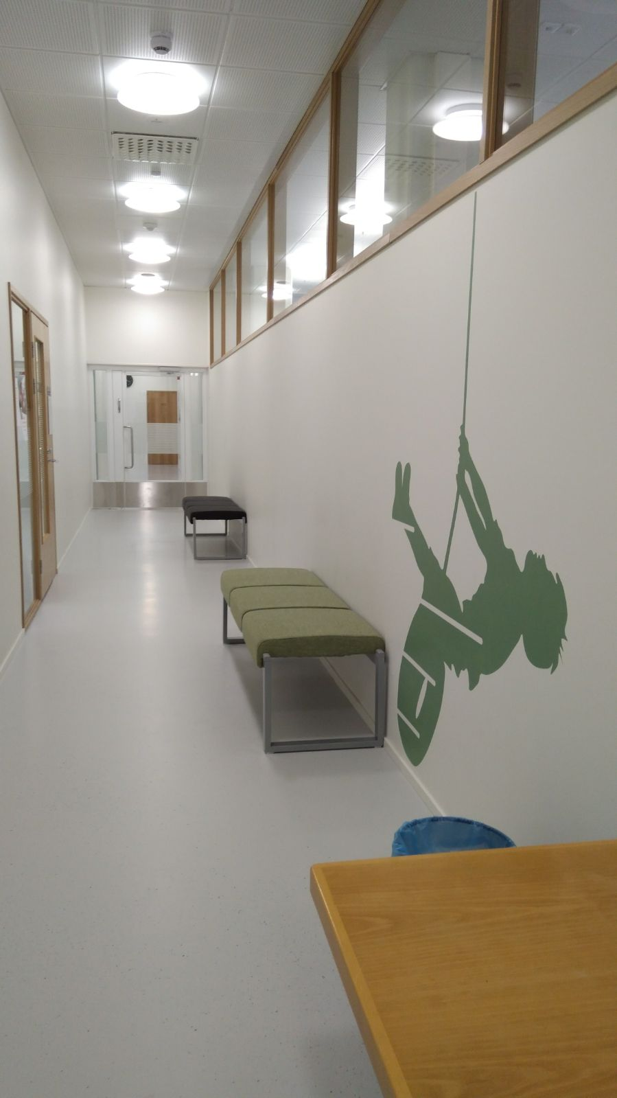 Monitoimitalo Monikon käytävää.